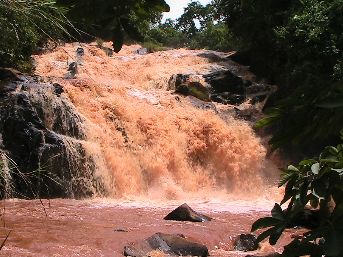 Chute mystique situé dans le domaine de la chefferie Badeng dans la région de l'ouest Cameroun.